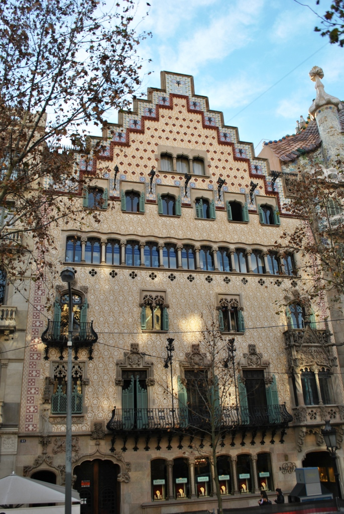 Casa Amatller